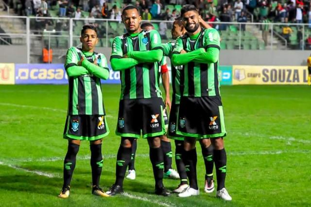 America mineiro